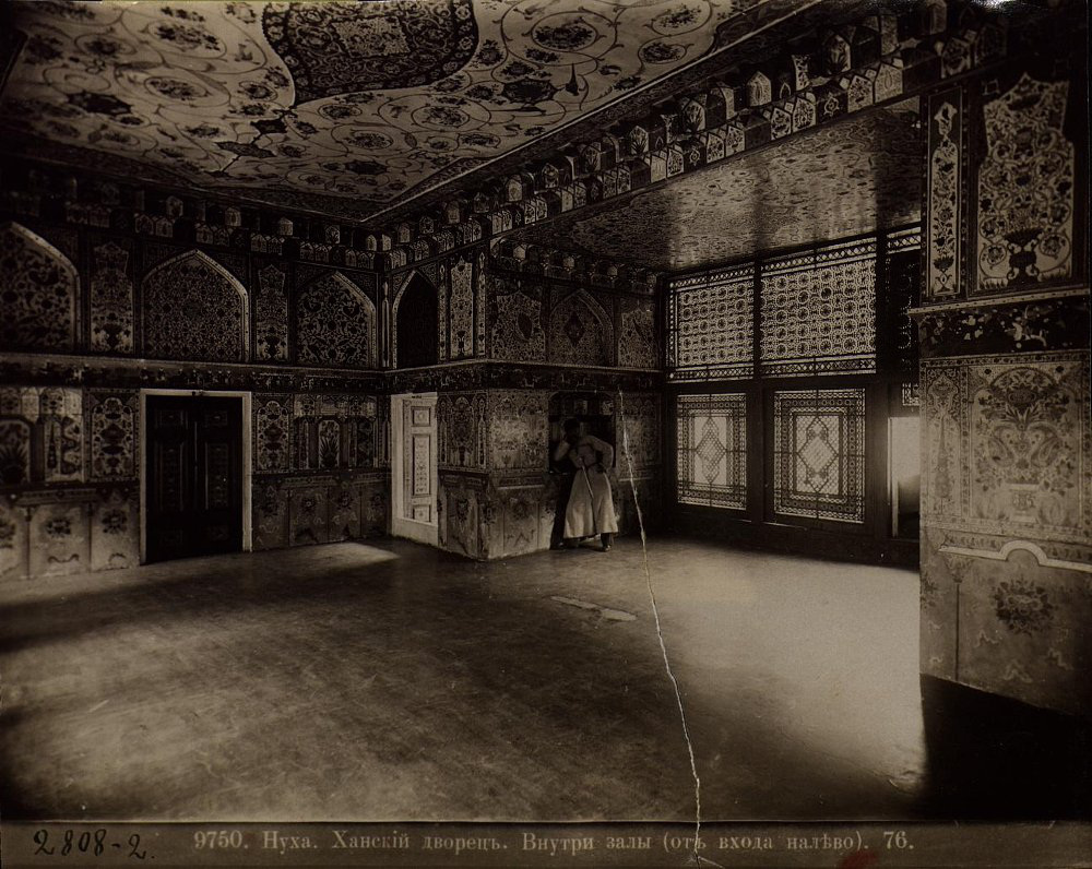 Вид зала ханского двора в Нухе